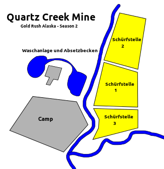 Karte der Goldmine